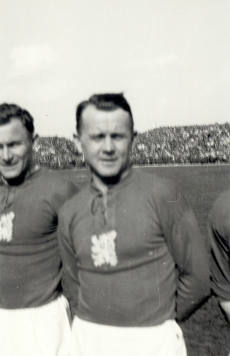 Jiří Zástěra v dresu českosloveské reprezentace